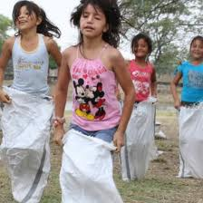 el trompo